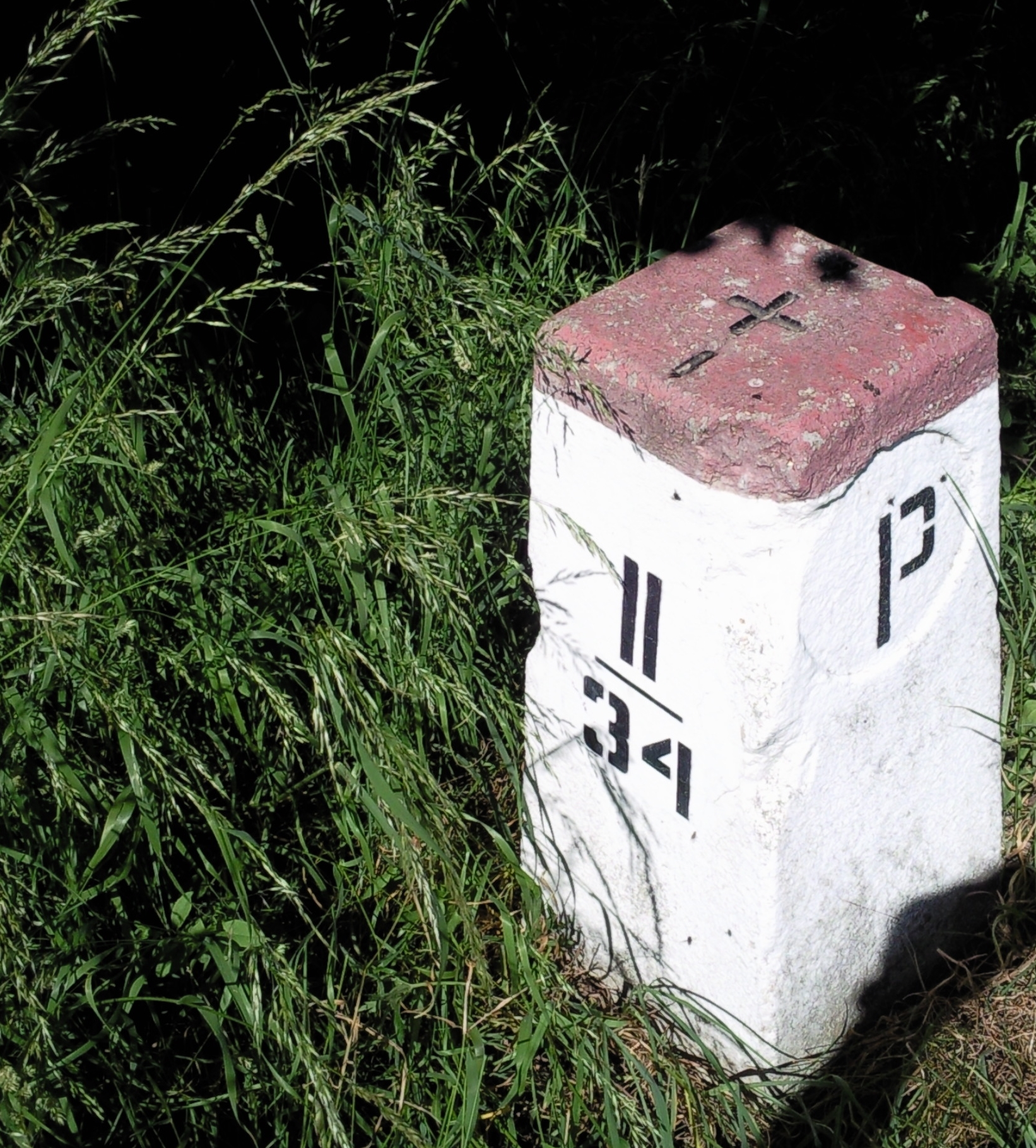 Przejście graniczne Krzanowice–Strahovice — znak graniczny nr II/34